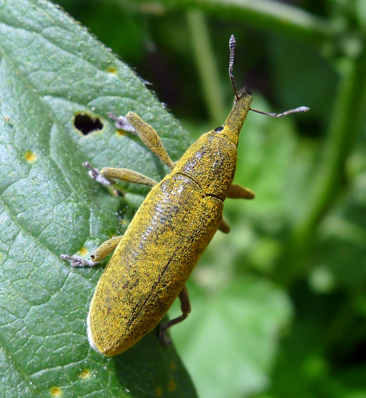 Weevil. Curculionidae. Lixus angustatus..?